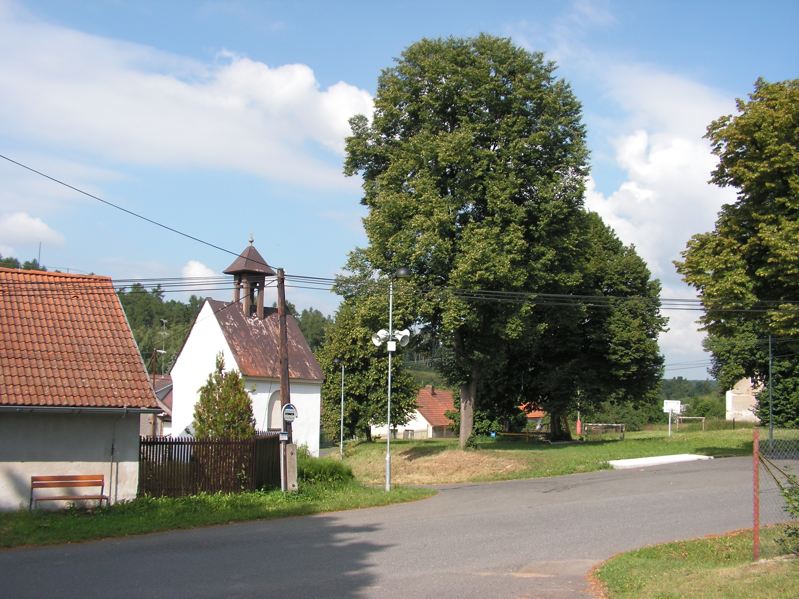 Nesměřice se nacházejí nedaleko Zruče nad Sázavou v okrese Kutná Hora.